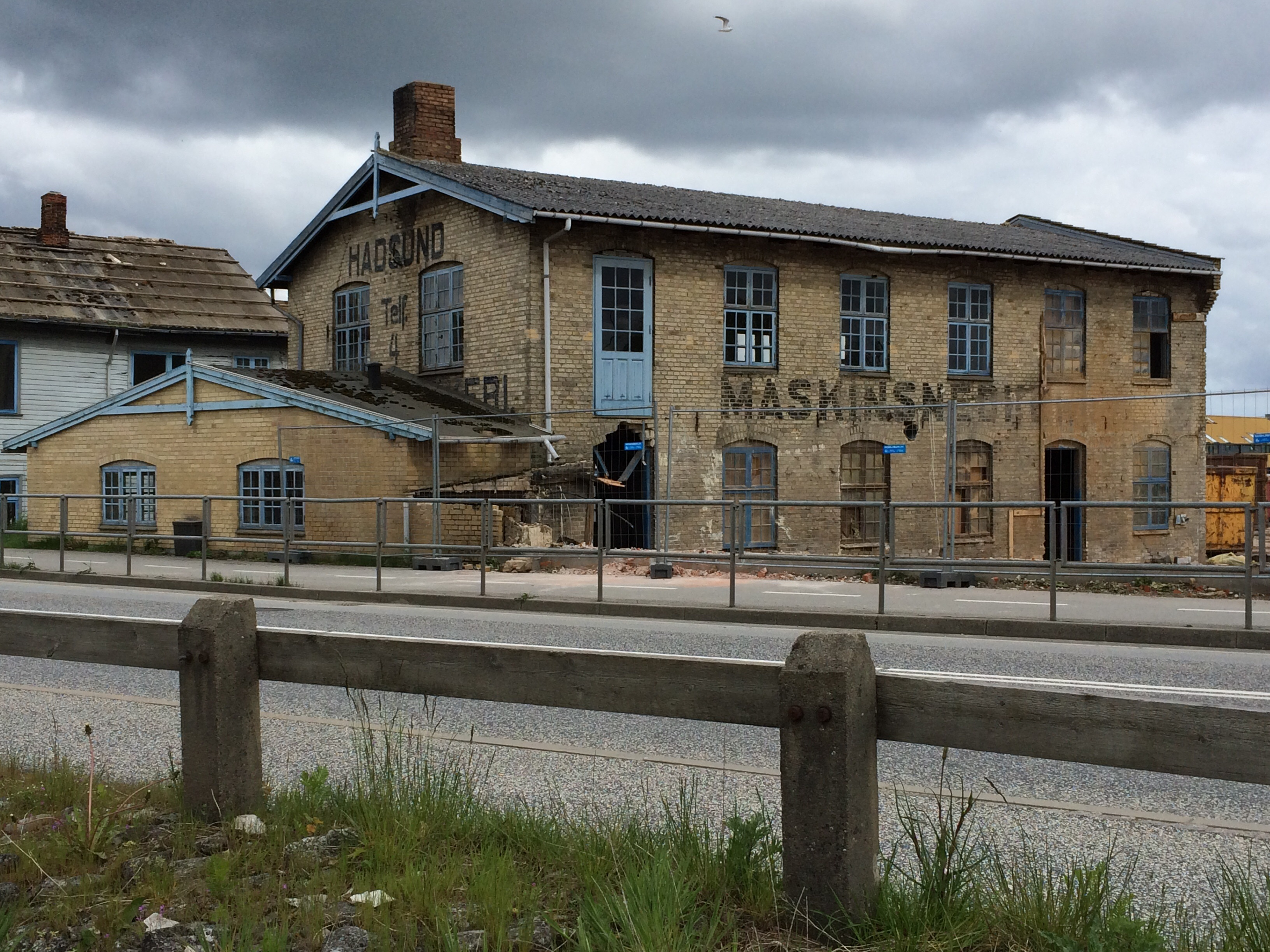 Maskinsnedkeriet 21. maj 2015. Set fra sydvest